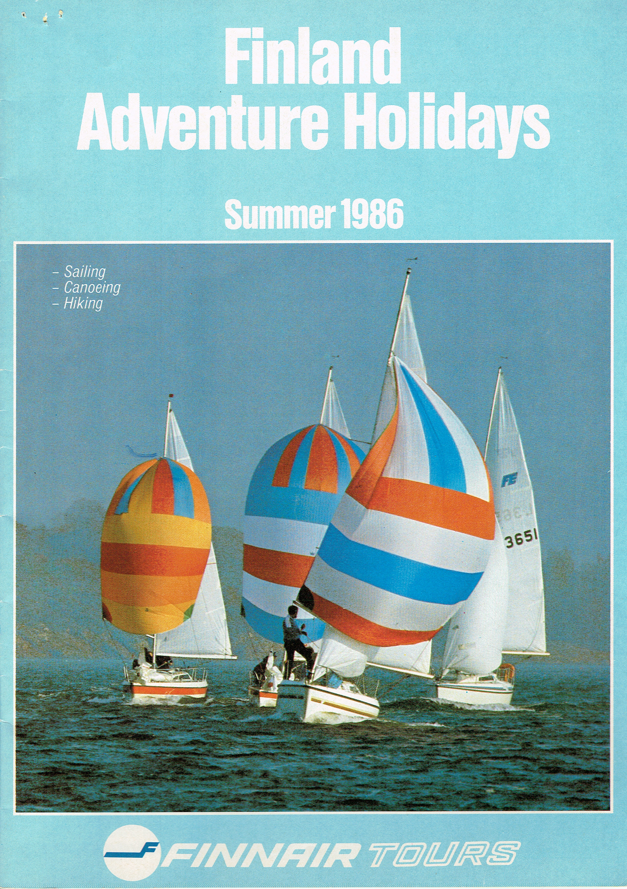 Incomingesite